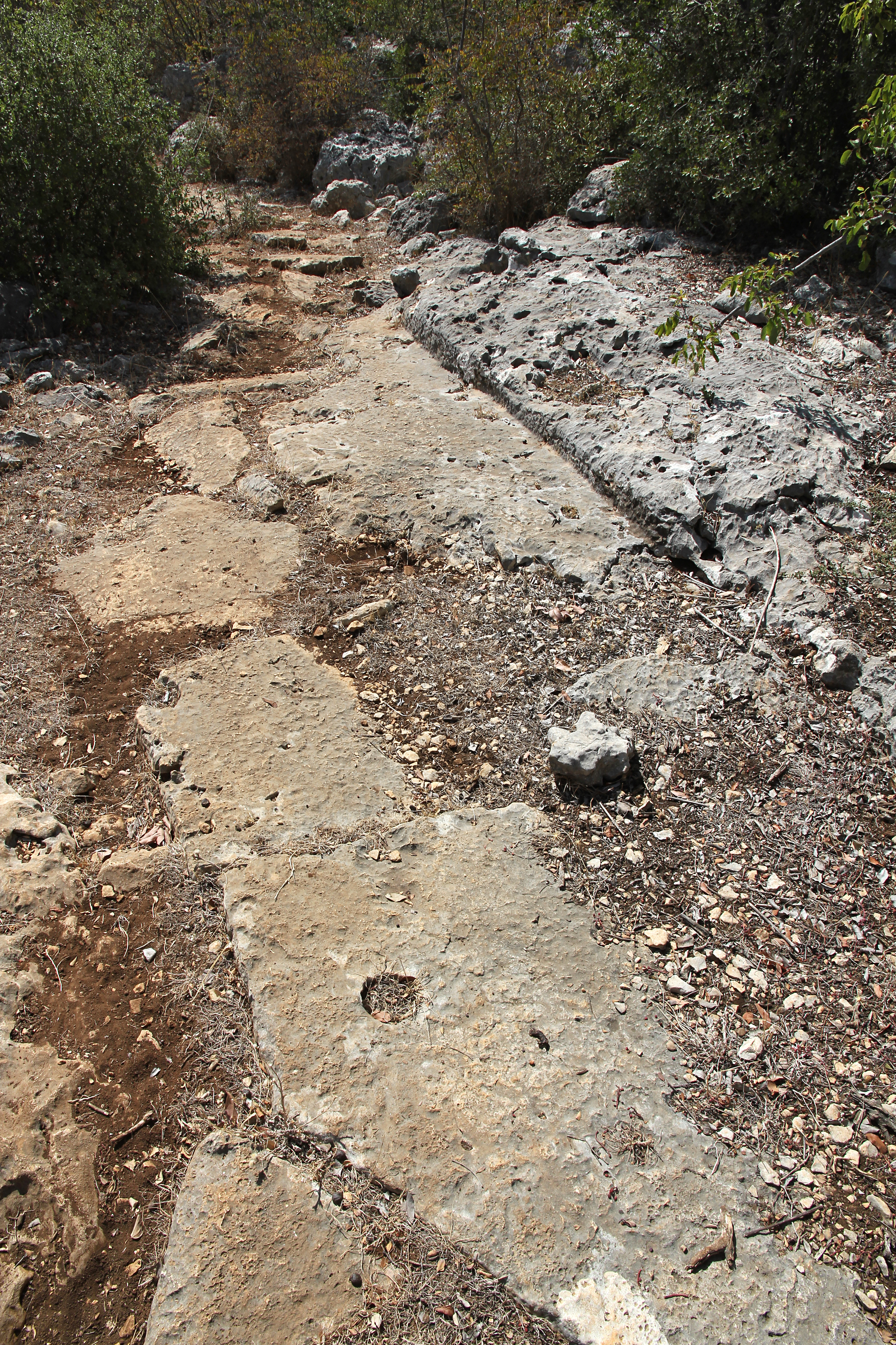 Yanıkhan, frühbyzantinische Dorfsiedlung mit zwei Säulenbasiliken in der Nähe von Erdemli, Südtürkei, antike gepflasterte Straße